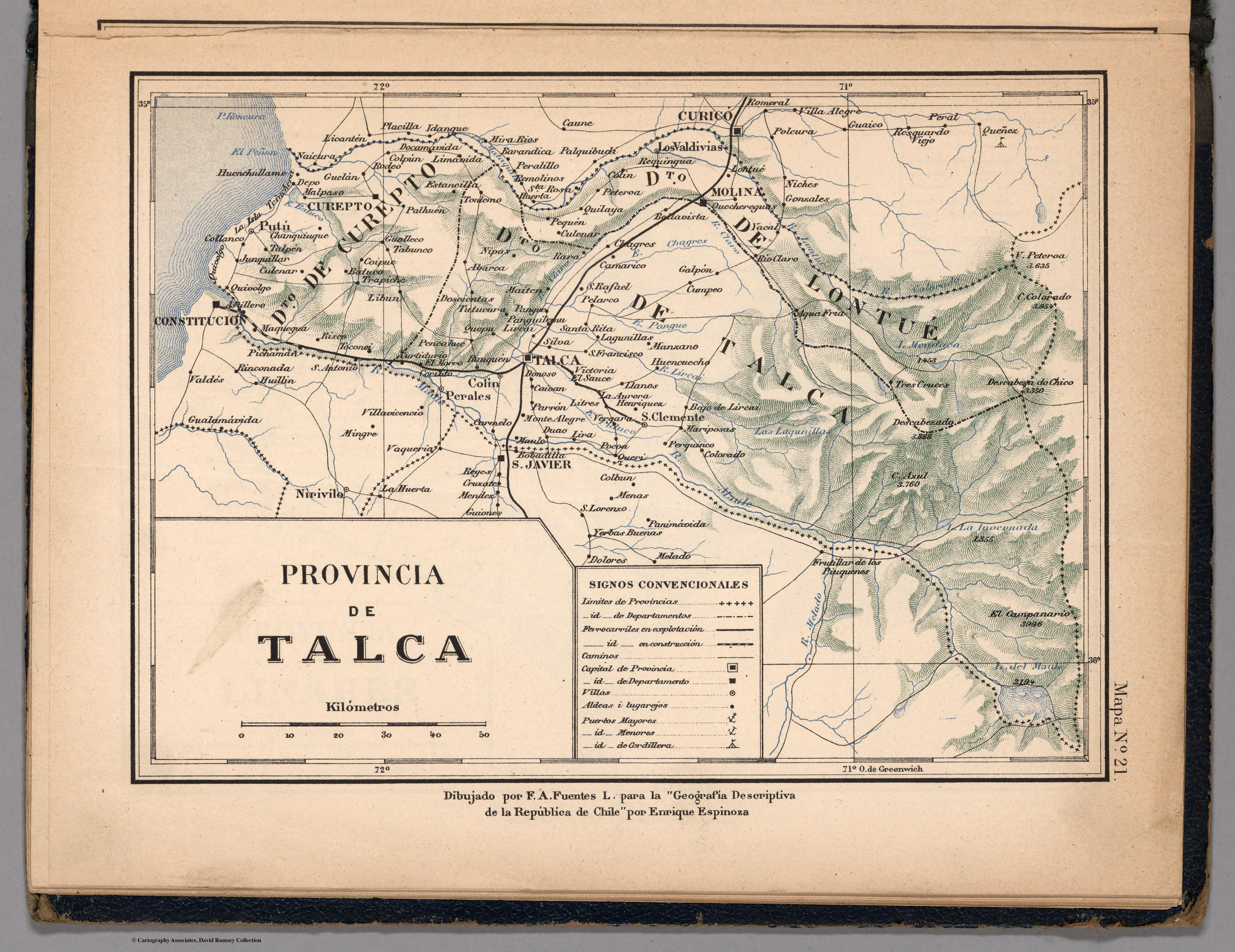 Atlas de Chile Arreglado para la Jeografia Descriptiva de la Republica de Chile por Enrique Espinoza.